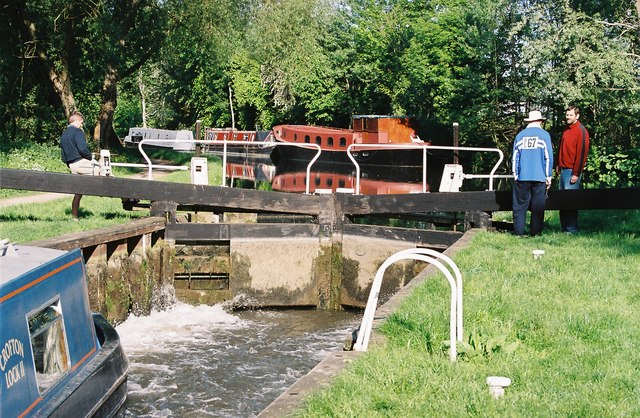 Ham Lock